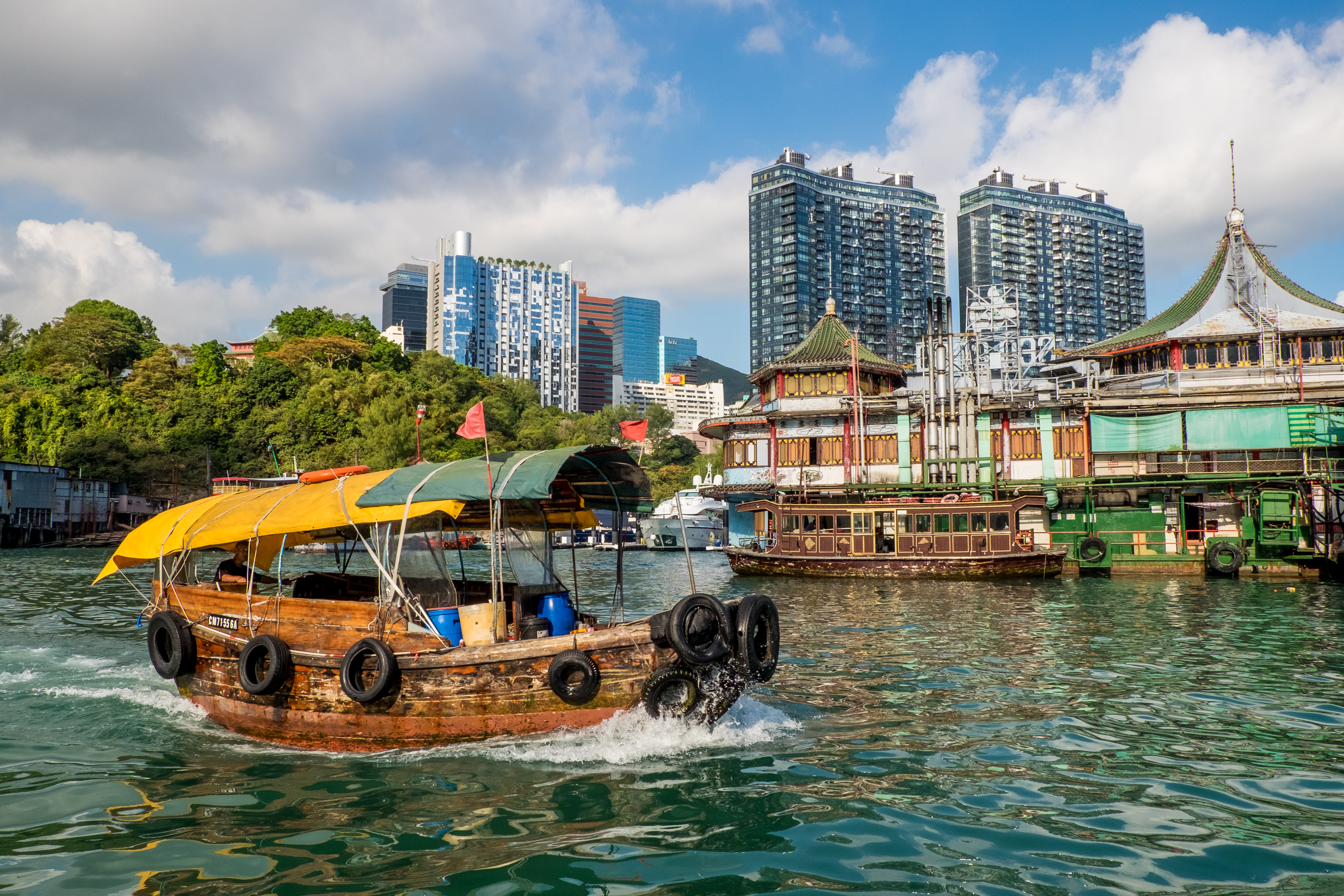 Hong Kong